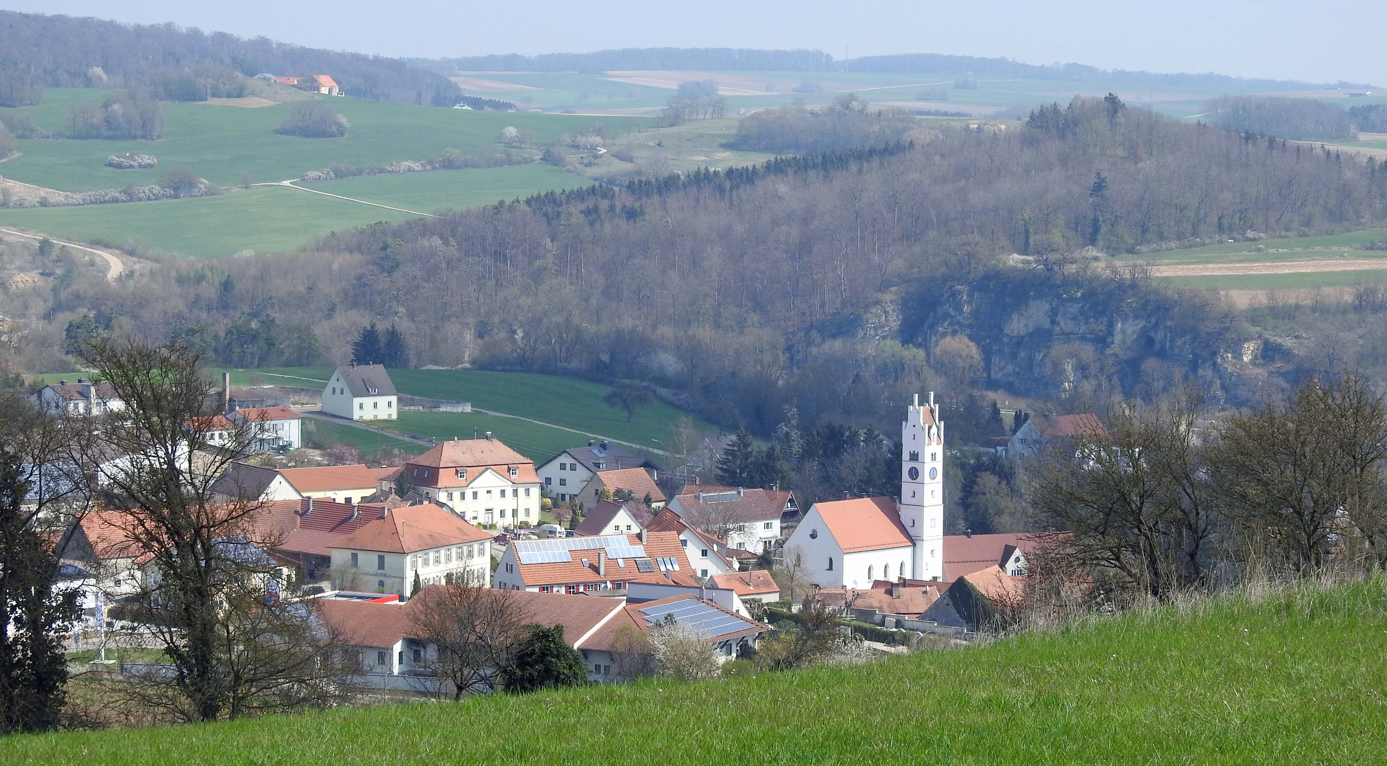 Teilansicht von Harburg (Schwaben)